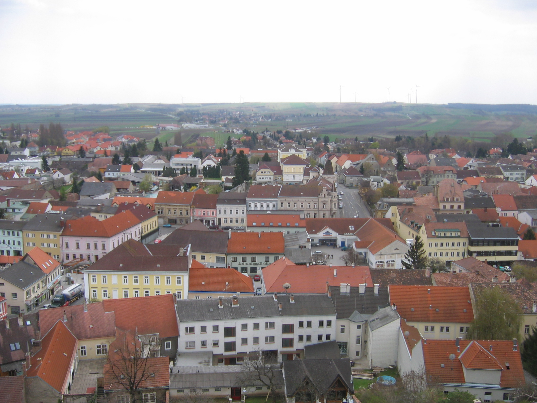 en: Poysdorf in Lower Austria seen from church spire, view in southern direction de: Blick über Poysdorf in Niederösterreich vom Kirchturm, Blick in südlicher Richtung